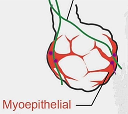 Células mioepiteliales rodeando un acino glandular.